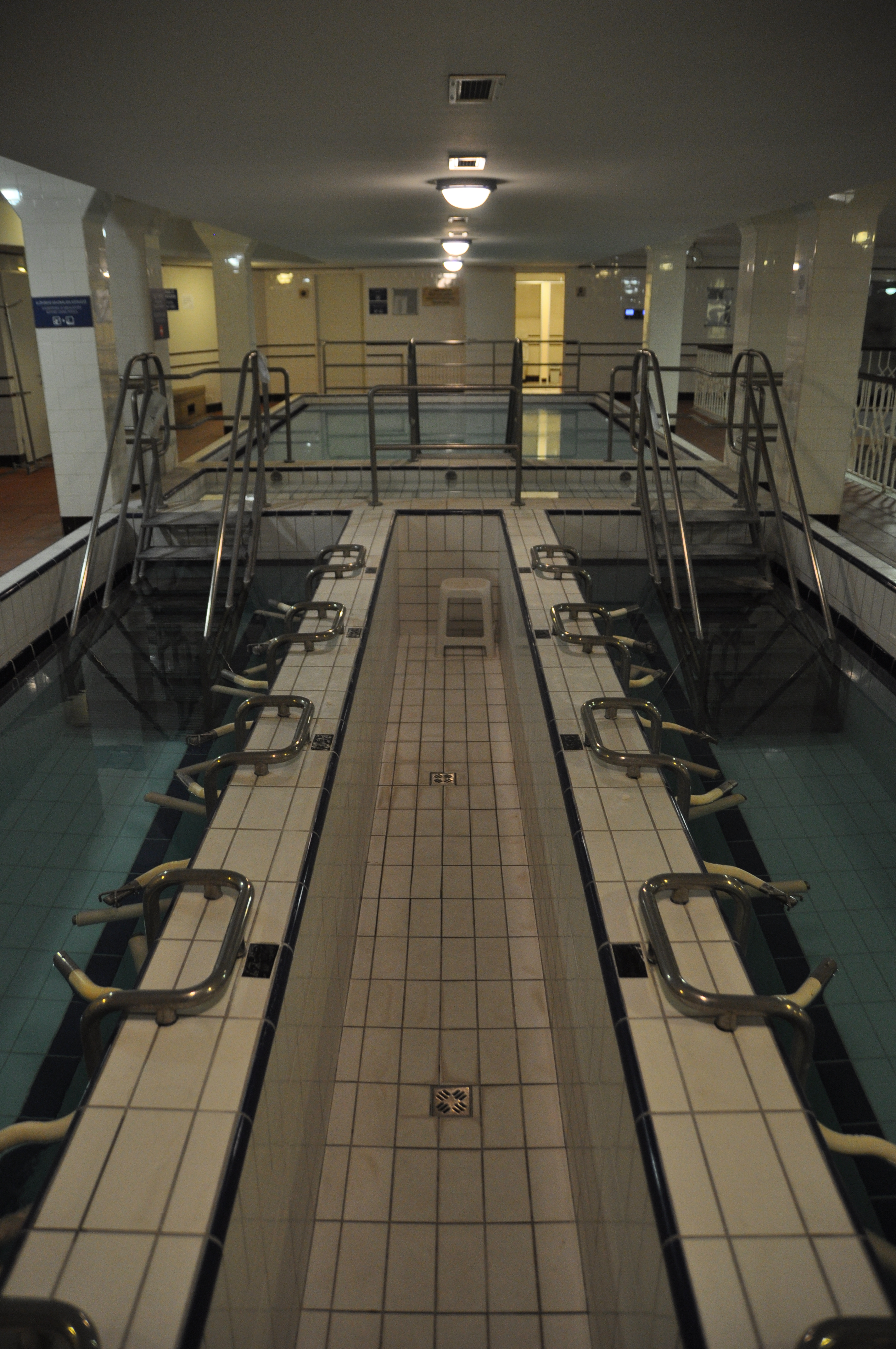 Budapest, Lukács fürdő, wellness részleg, súlyfürdő medence